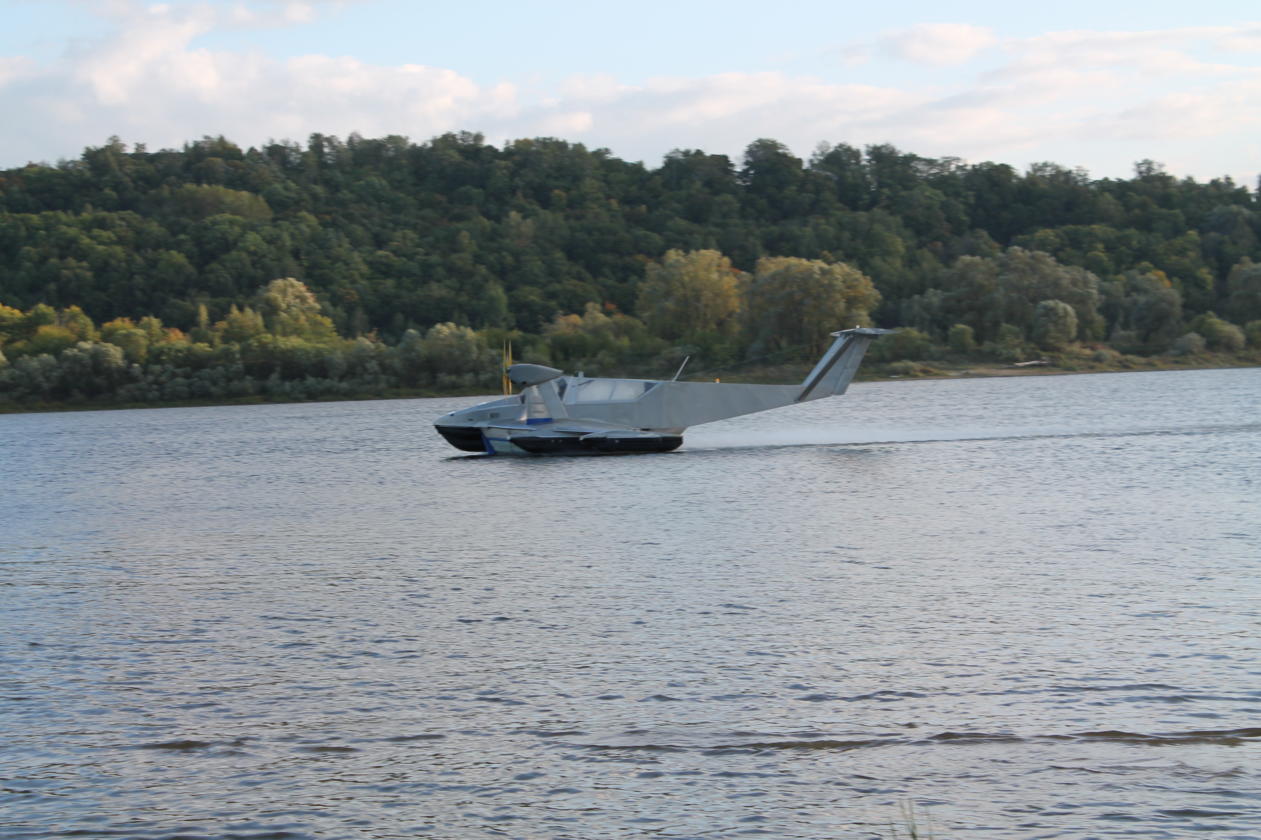 Испытания СВПАП ТУНГУС